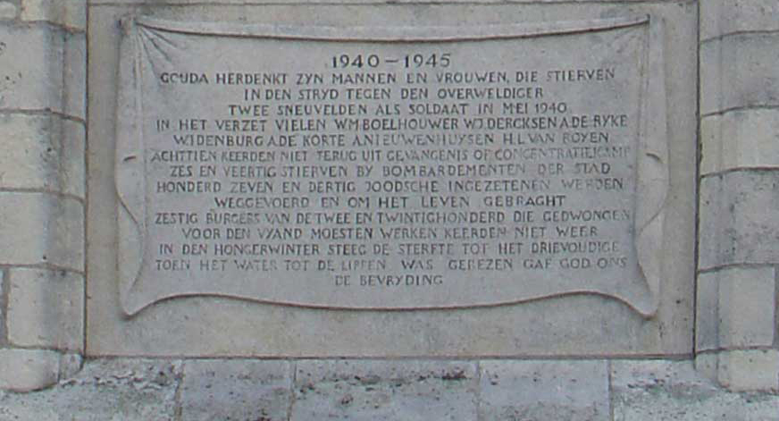 Sint Joris en de draak (detail) door Oswald Wenckebach - Markt (stadhuis) Gouda